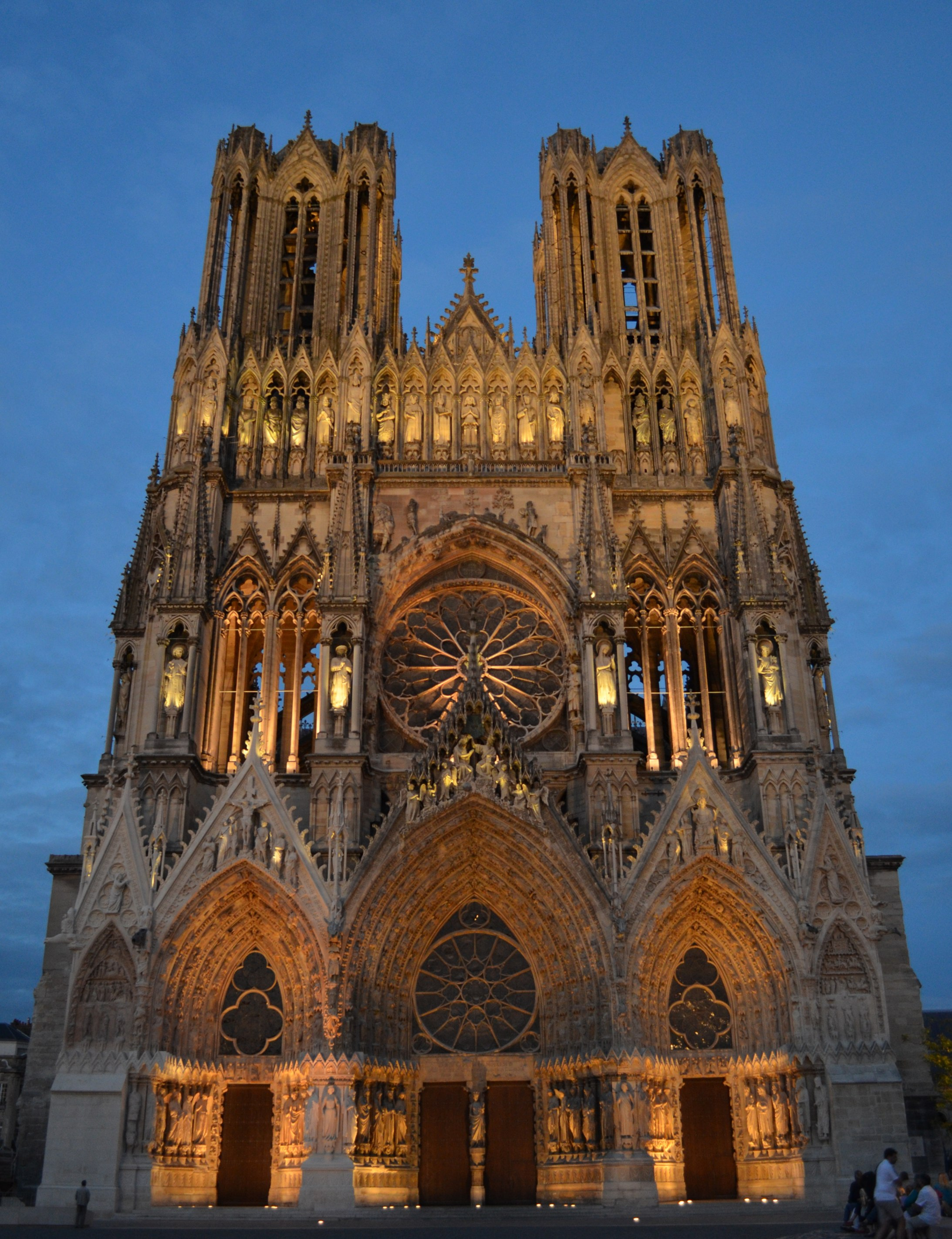 La cathédrale Notre-Dame de Reims (Champagne-Ardenne, FRance)